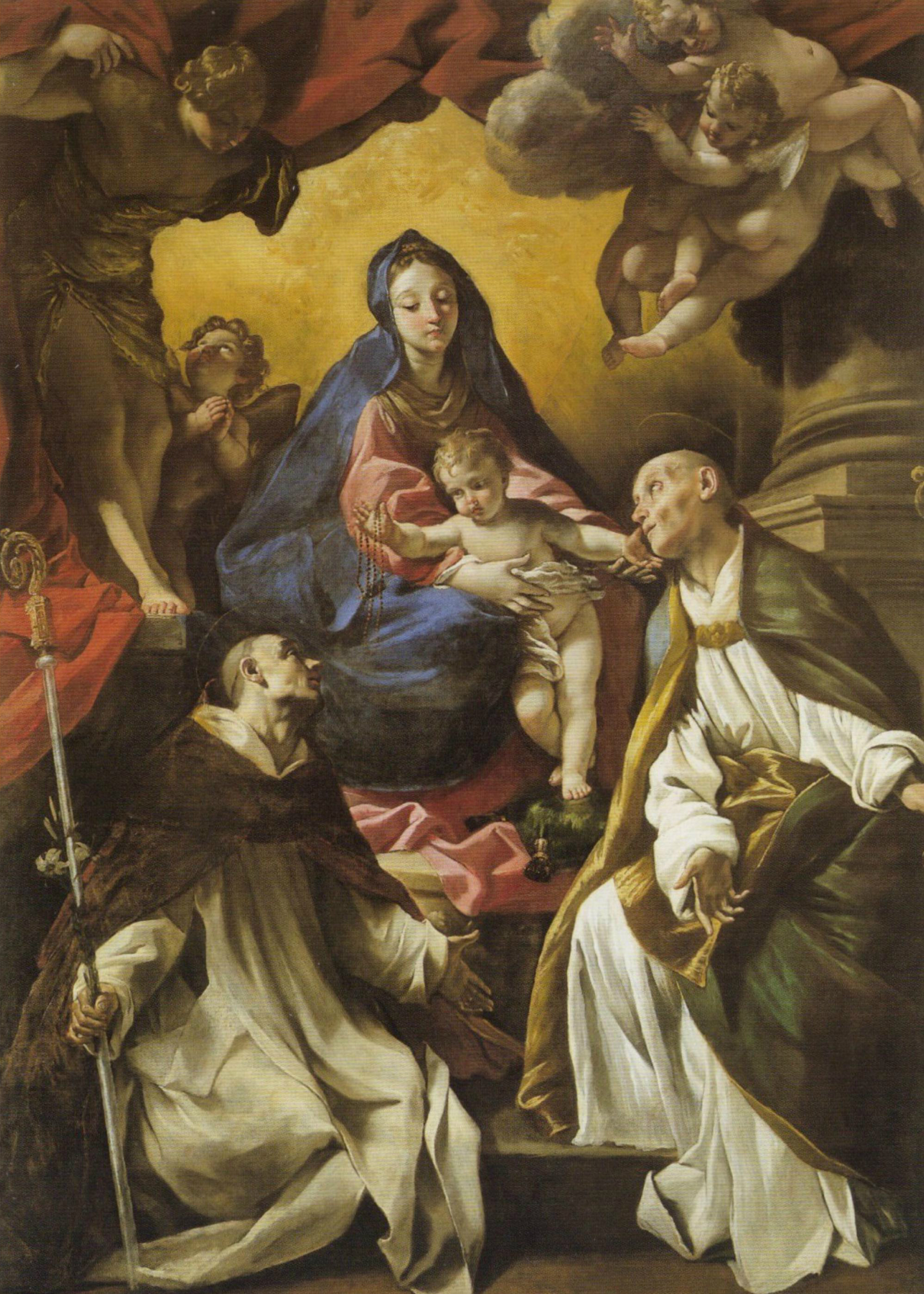 Madonna del Rosario